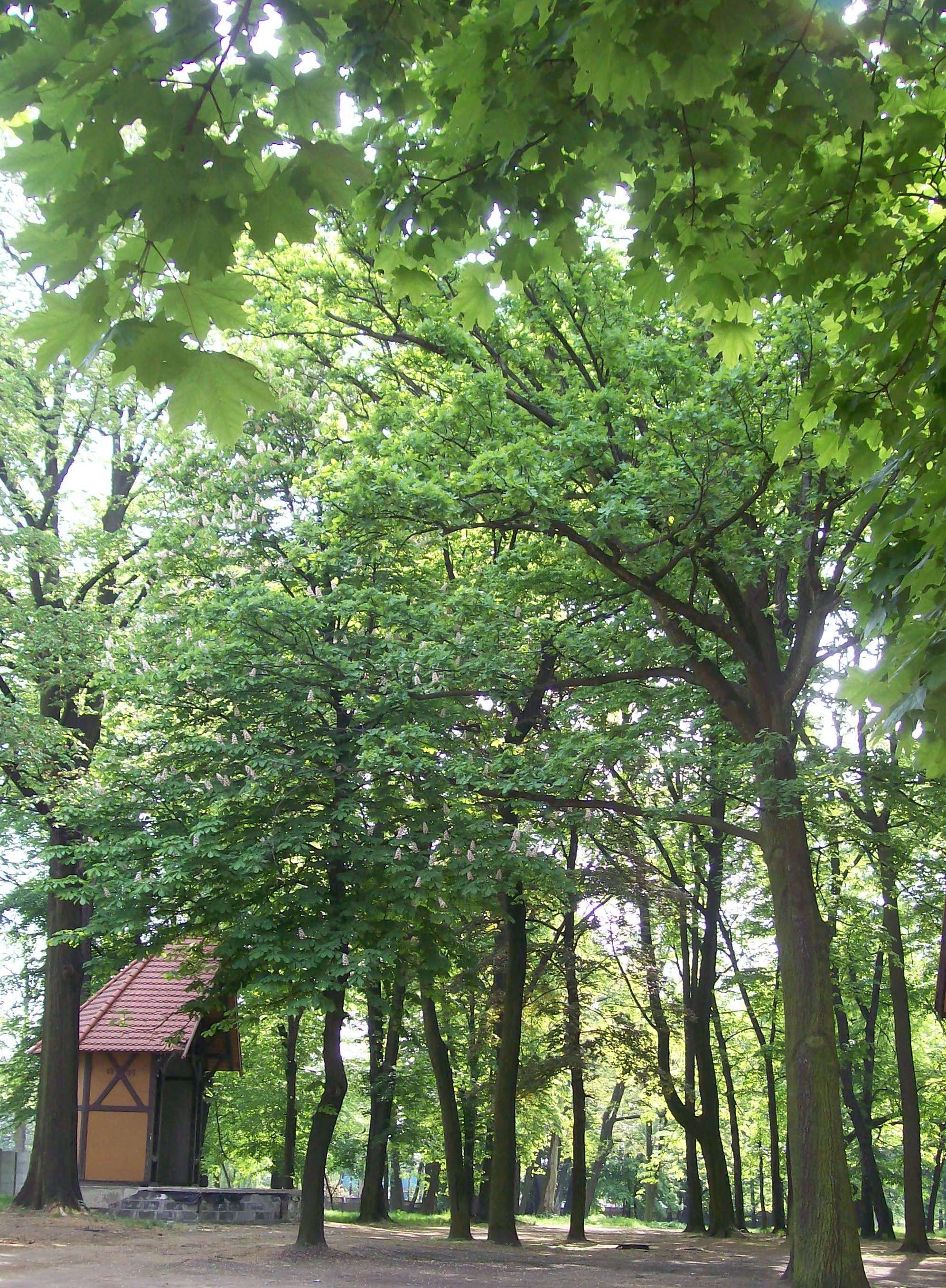 Zespół pałacowy w Tychach ul. Katowicka 2. Park Browarniany z muszlą koncertową.